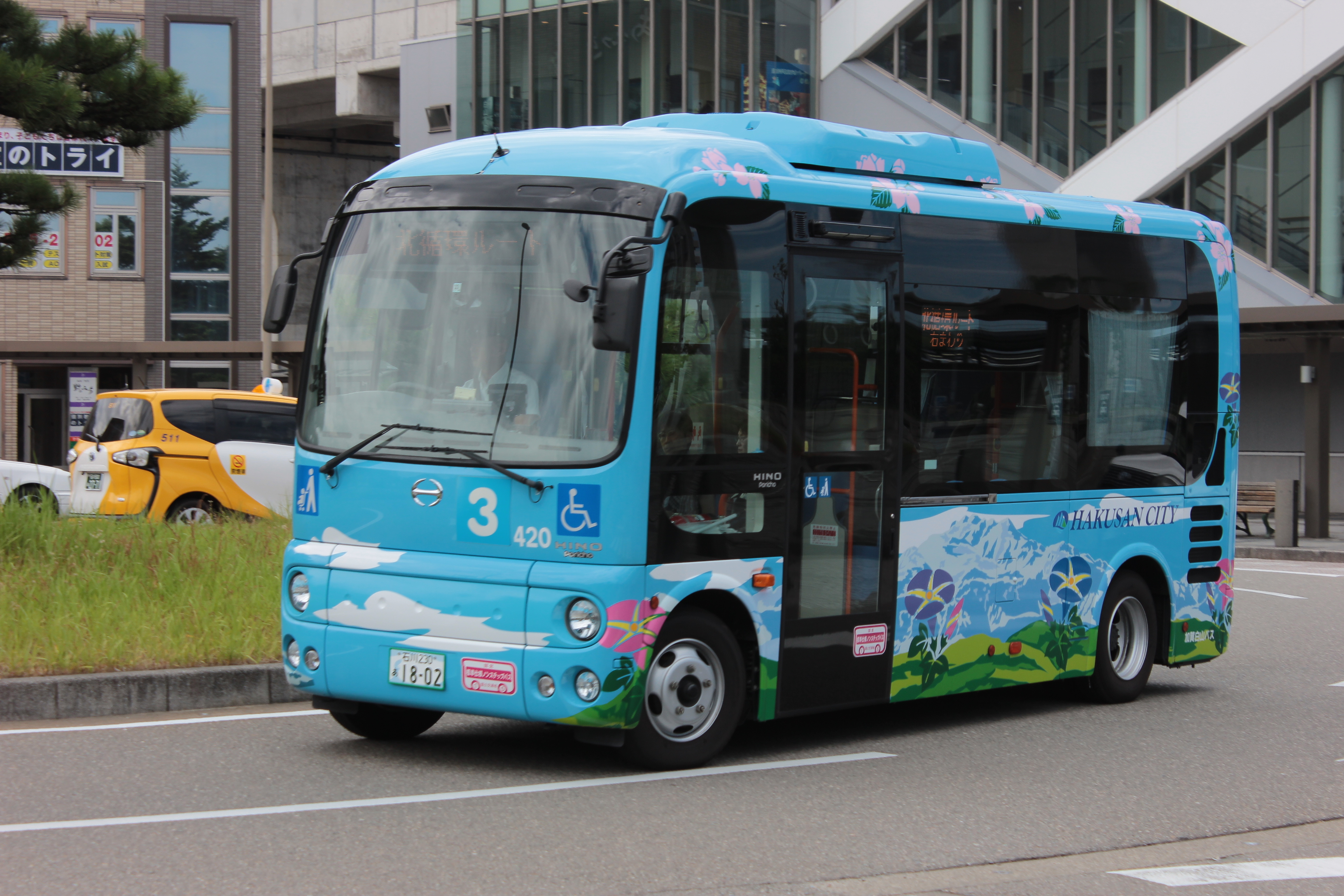 石川県白山市のコミュニティバス「めぐーる」（松任駅前にて） Canon EOS Kiss X5